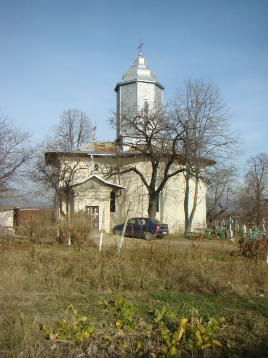 Biserica Sf Ioan din Sasenii Noi, Buzau